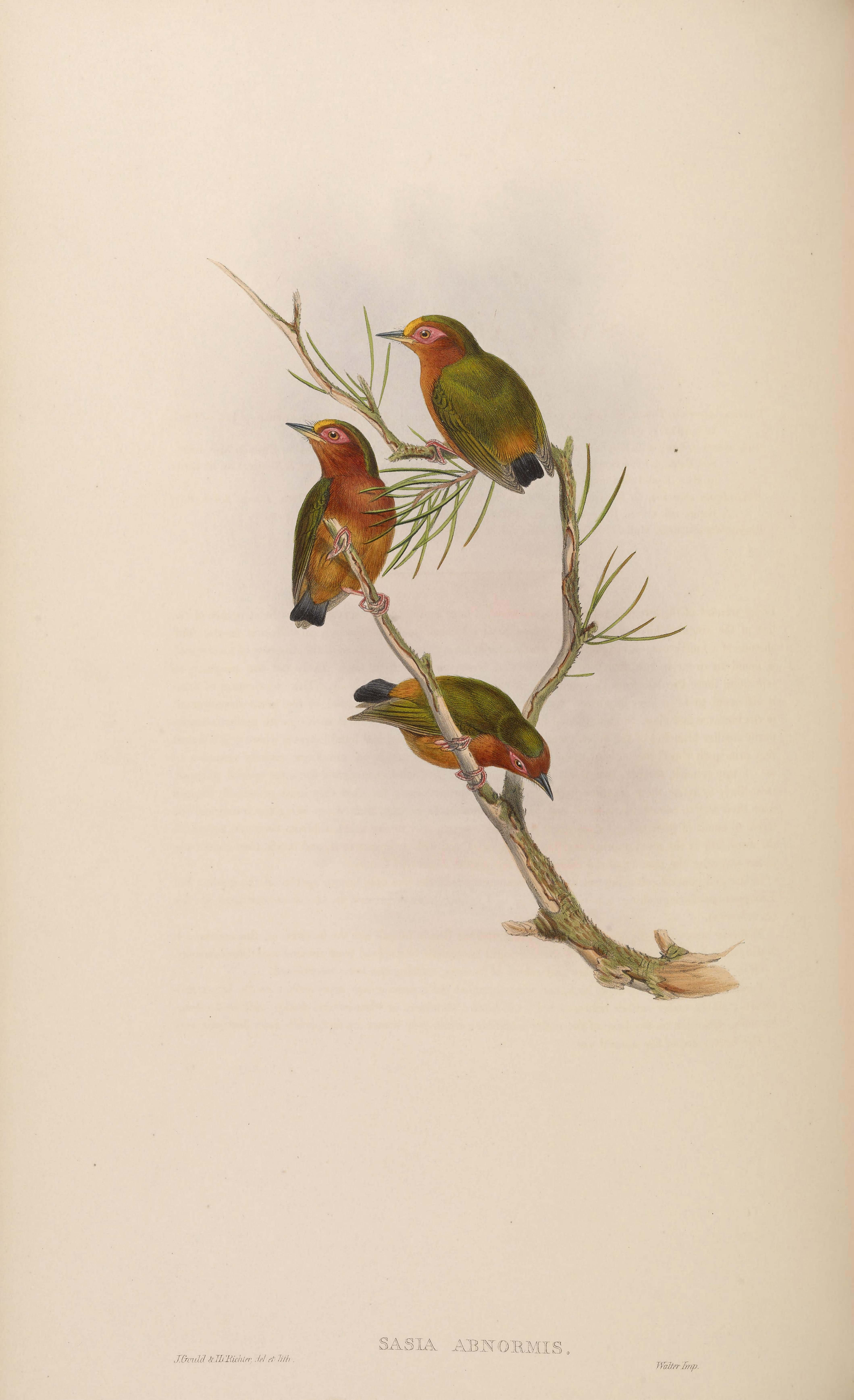 Sasia abnormis